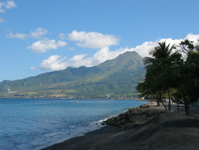 Vue du Mont Pelé en Martinique